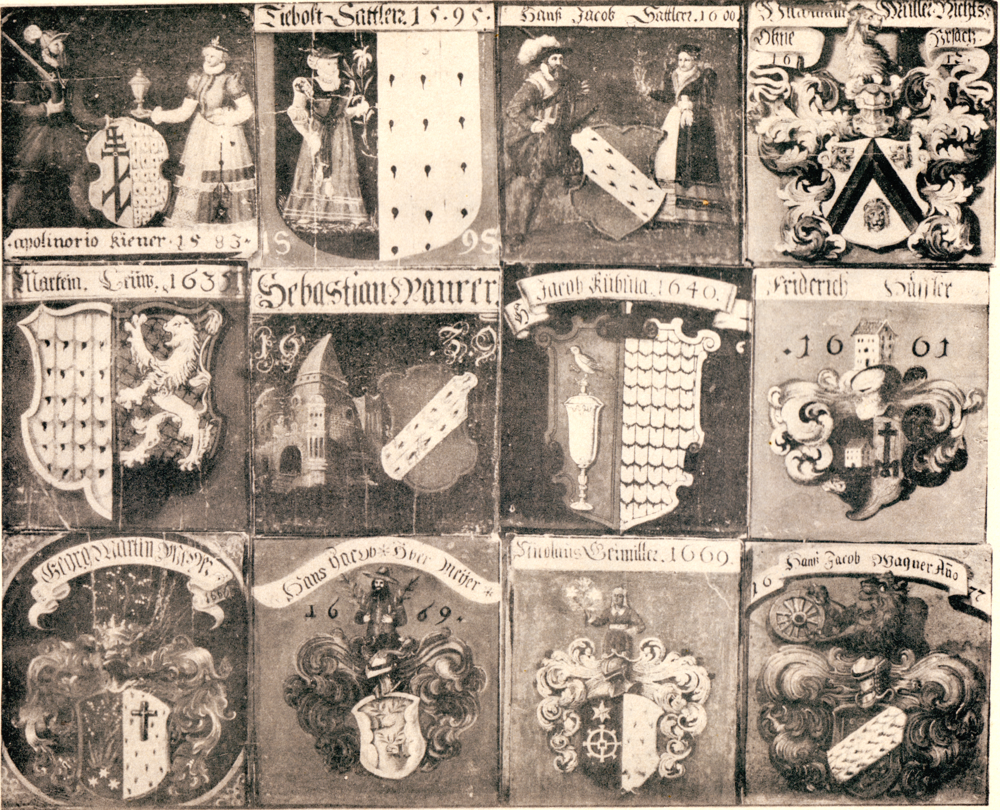 Die Kürschnern-Zunft zu Basel Wappentafel. Mit Emblemen und Vorgesetzten aus dem 16. und 17. Jahrhundert Die Wappen waren 1872 im Zunfthaus zum Vorschein gekommen und auf den Vorschlag des Zunftmeisters, Oberst August Hübschers, hin restauriert und gerahmt worden.